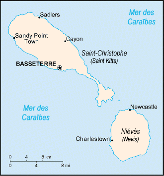 Carte de Saint-Christophe-et-Niévès provenant du CIA World Factbook Historique de la carte originale (suppr) (actu) 22 novembre 2003 à 18:57 . . Rinaldum . . 330x355 (14538 octets) (de en:)